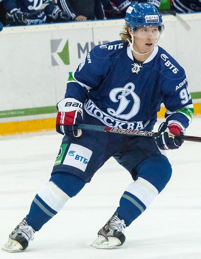 Нападающий московского «Динамо» Никлас Бэкстрём во время матча чемпионата КХЛ против донецкого «Донбасса» 31 октября 2012 года.